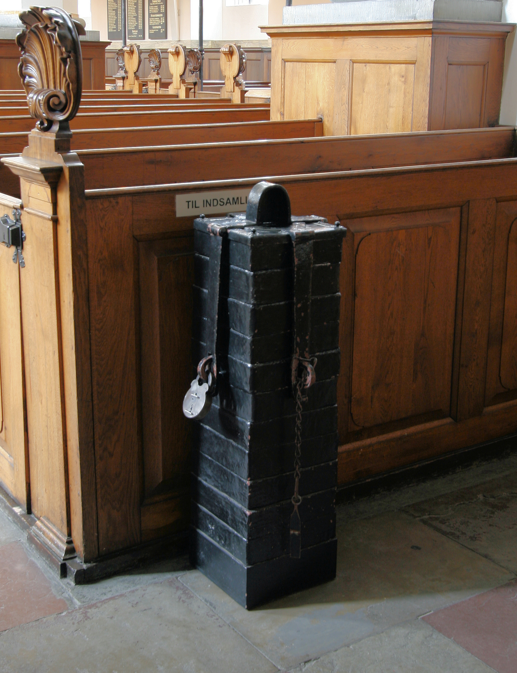 Trinitatis Kirke, Copenhagen, Denmark. Pengeblok.